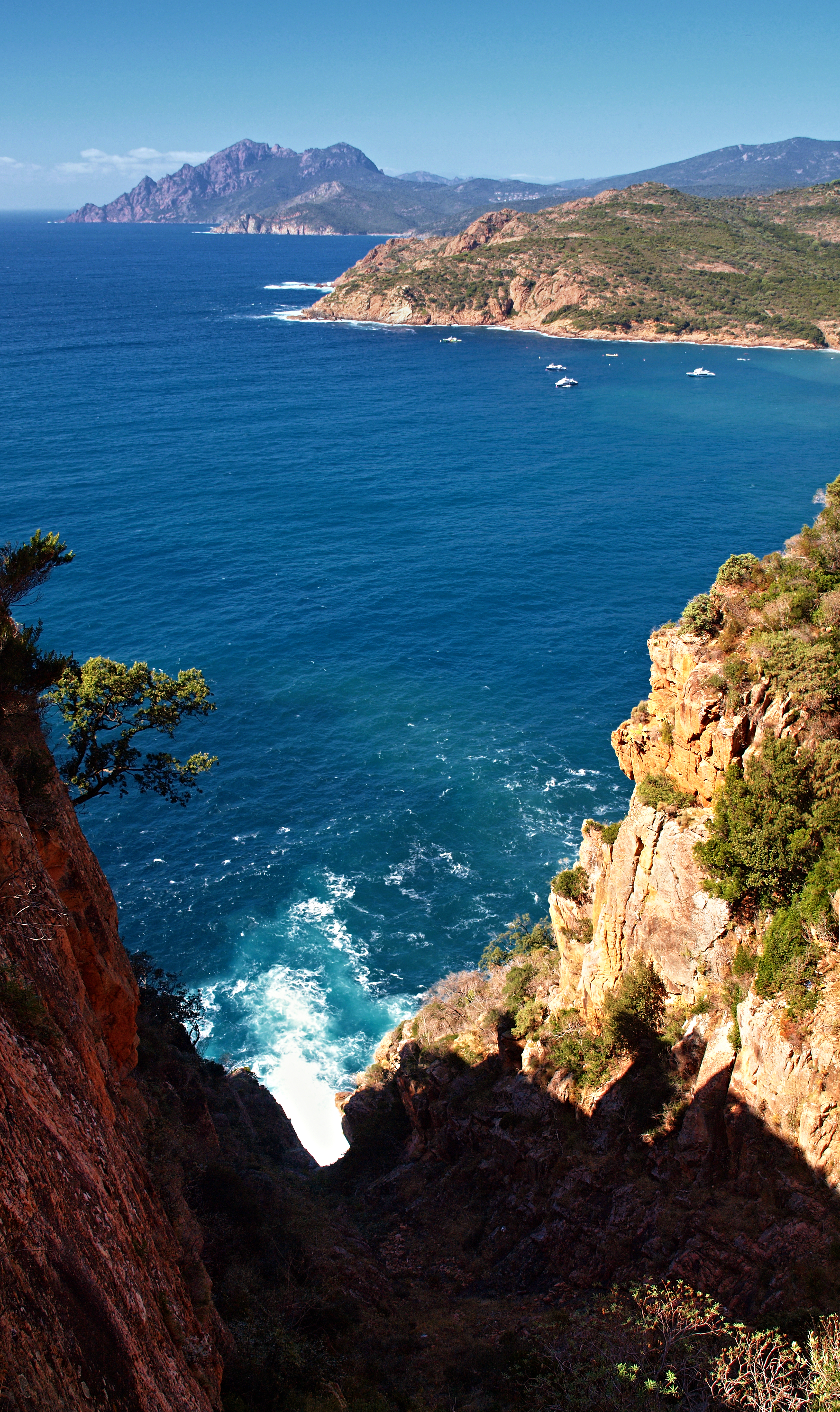 Ota (Corsica) - Littoral nord du golfe de Porto